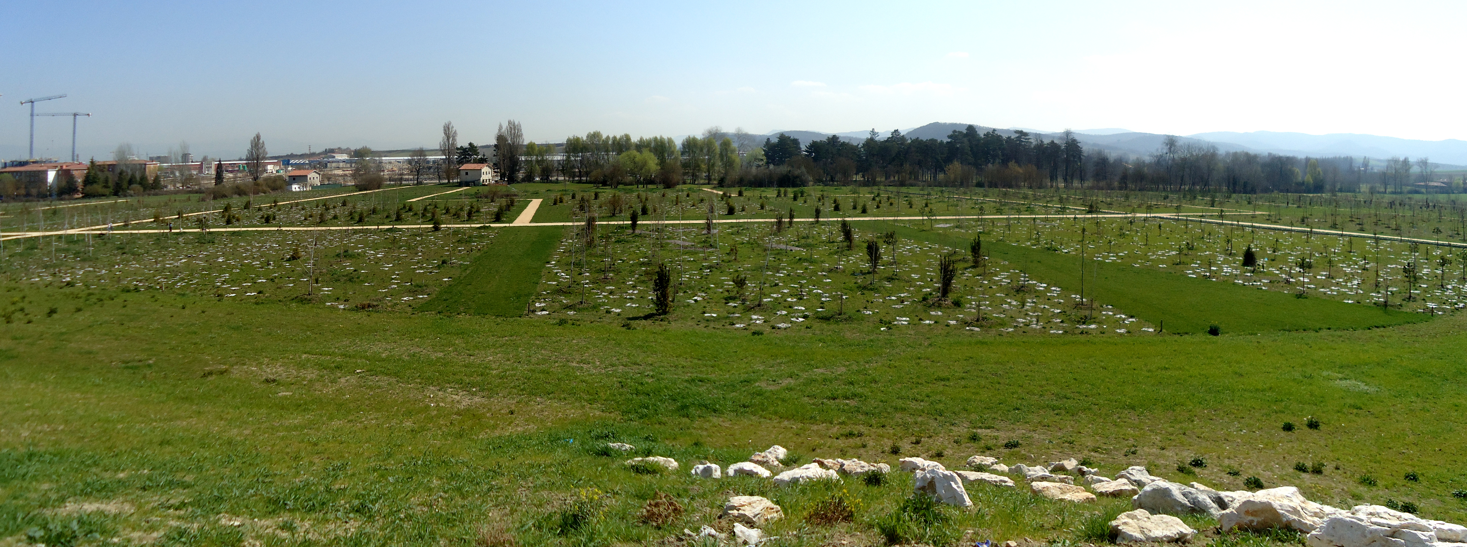 Olarizuko (Gasteiz) lorategi botanikoa